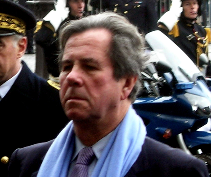 Description =Mr Jean-Louis Debré, président de l'Assemblée Nationale, cérémonie du 11 novembre 2006 à Paris Source =Photo taken by Remi Jouan Date =Novembre 2006 Author =Remi Jouan